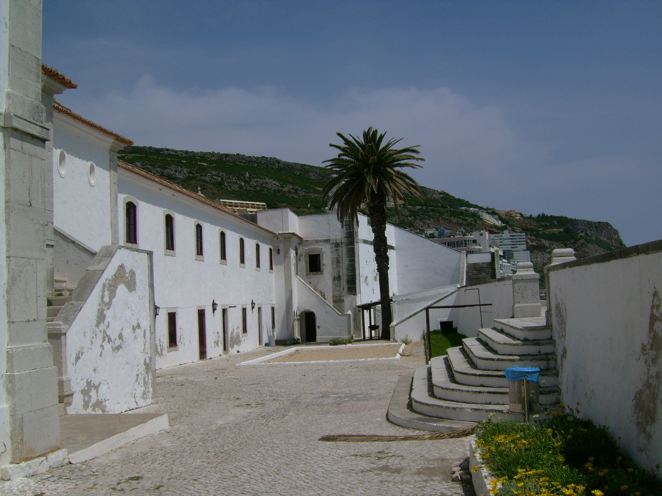 Fortaleza de Santiago o seu interior user:sacavem